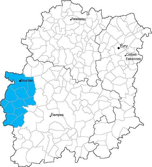 Carte de localisation du canton de Dourdan en Essonne (91)